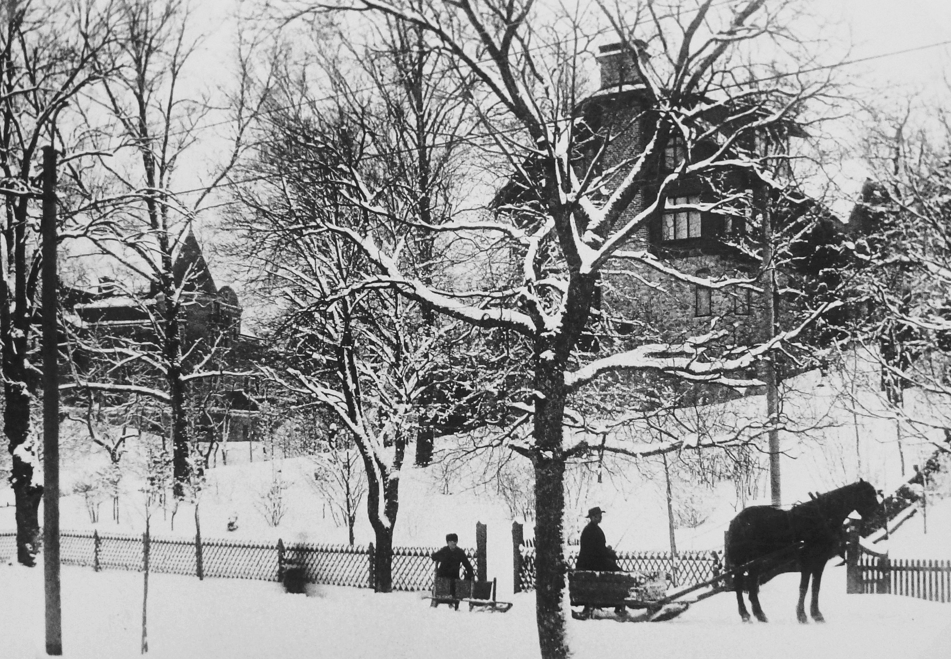 Fastigheten Odilslund 9, Djursholm